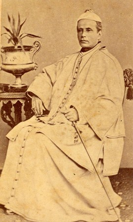 Monseñor Joaquín Guillermo González, Obispo de la Diócesis de Antioquia, (hoy Arquidiócesis de Santa Fe de Antioquia). Colombia.